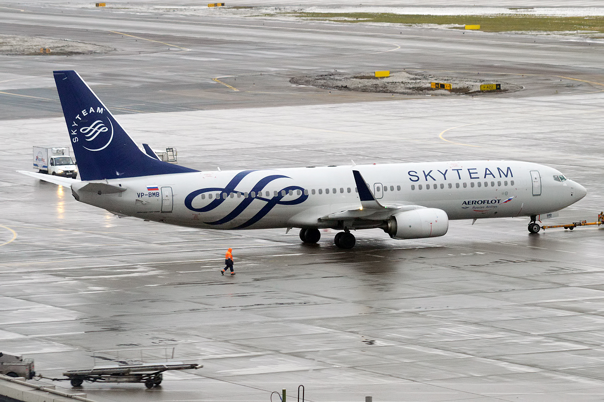 Aeroflot, VP-BMB, Boeing 737-8LJ